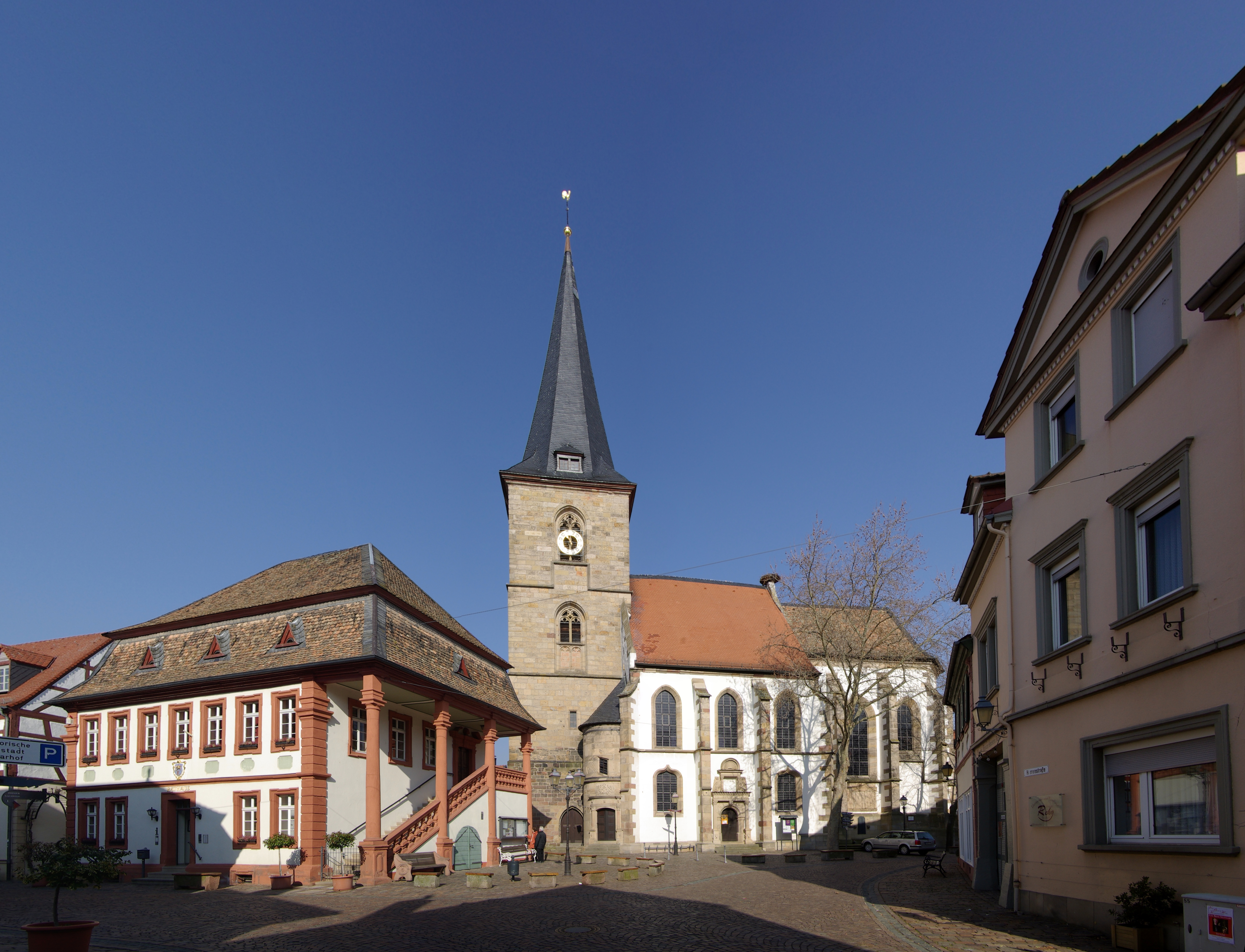 Freinsheim, links: Rathaus; spätbarocker Mansardwalmdachbau, um 1730/31, Architekt Sigismund Zeller, Portal der Außentreppe bezeichnet 1750 rechts: Protestantische Pfarrkirche; spätgotische Halle, ab 1470, mit Teilen des romanischen Westturms, Treppenturm bezeichnet 1592; Beinhaus eventuell aus dem 13. Jahrhundert